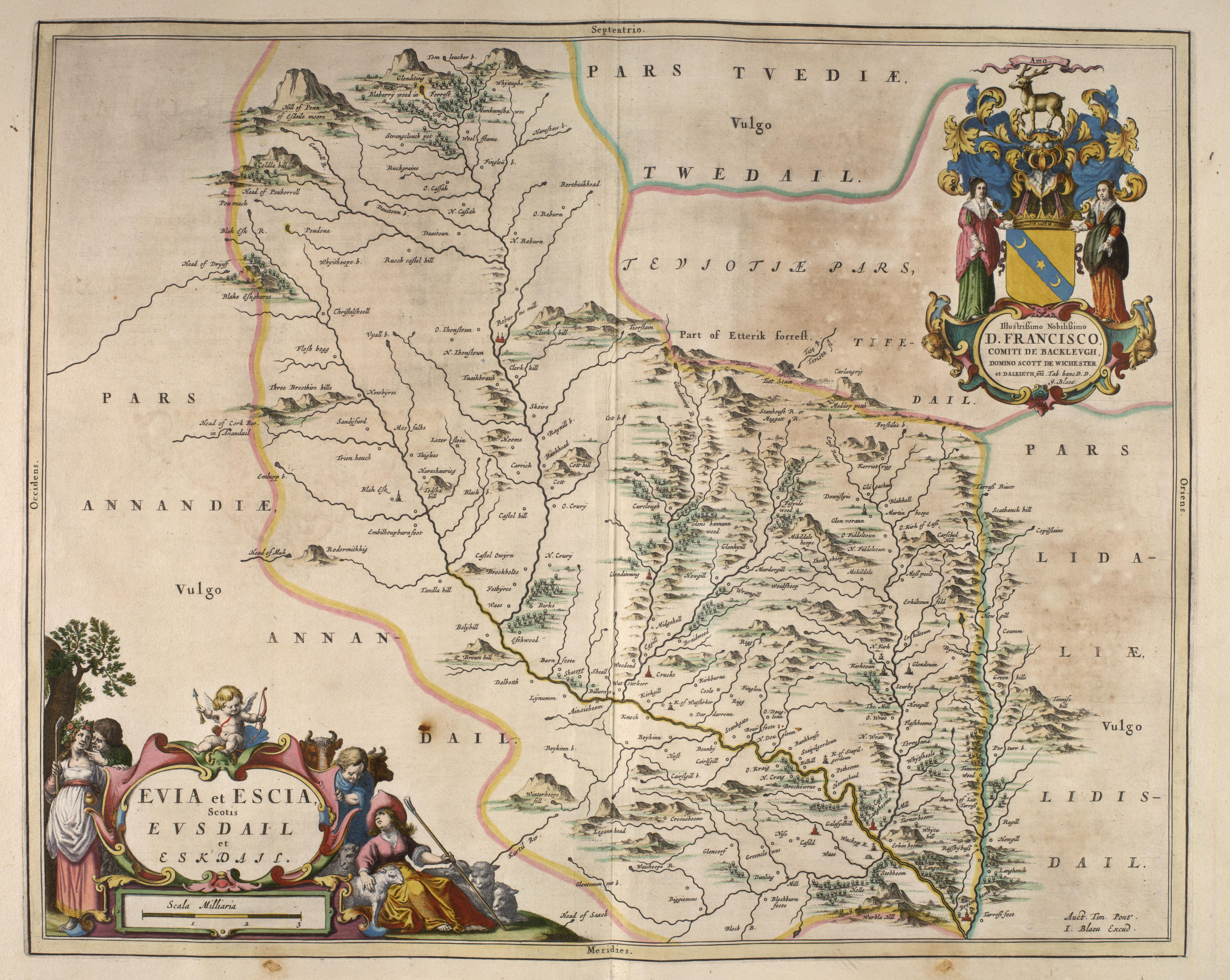 EVIA ET ESCIA - Eskdale